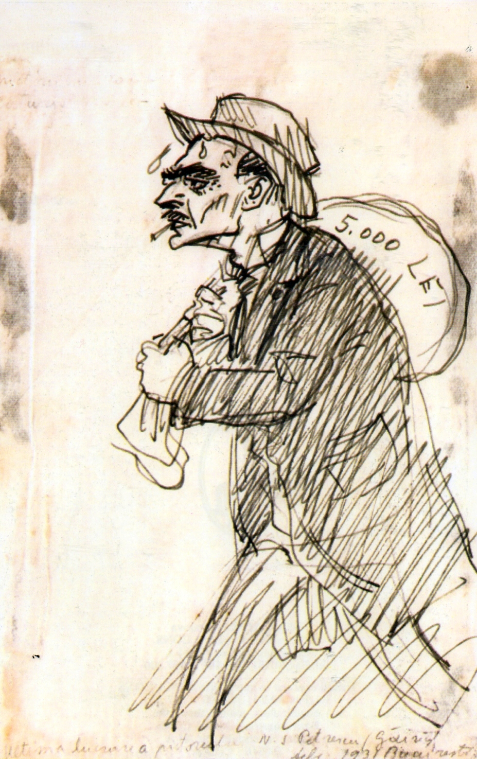 Autoportret cu sacul cu bani. Ultima lucrare a pictorului N.S. Petrescu-Găină